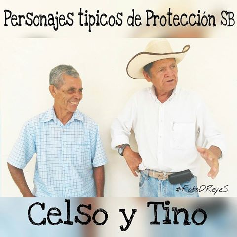 Ślůnski: dos personas muy amables y chabacanas, características de las personas de Protección, Don Tino Plato y Celso Caspa son personajes típicos de nuestra cultura.